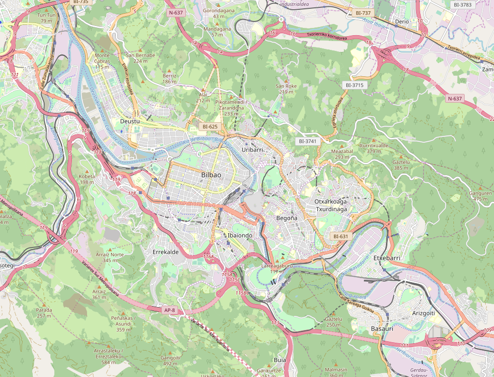 Bilbo hiriko kokapen mapa. Bizkaia, Euskal Herria - Location map of Bilbao city. Bizkaia, Basque Country.